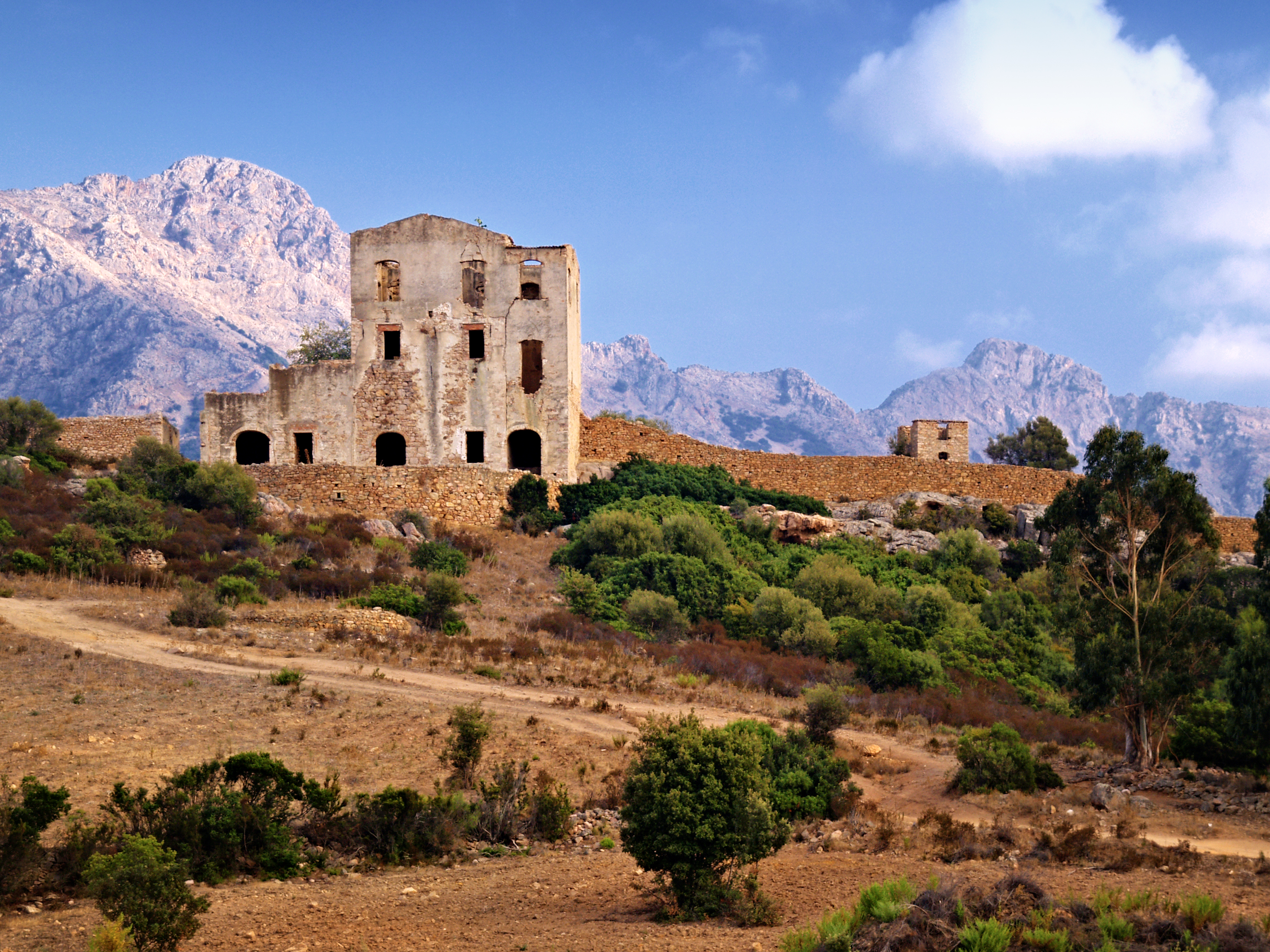 Calenzana - Ancienne résidence de chasse du prince Pierre-Napoléon Bonaparte. À droite du bâtiment, la Torra Mozza, tour génoise ruinée